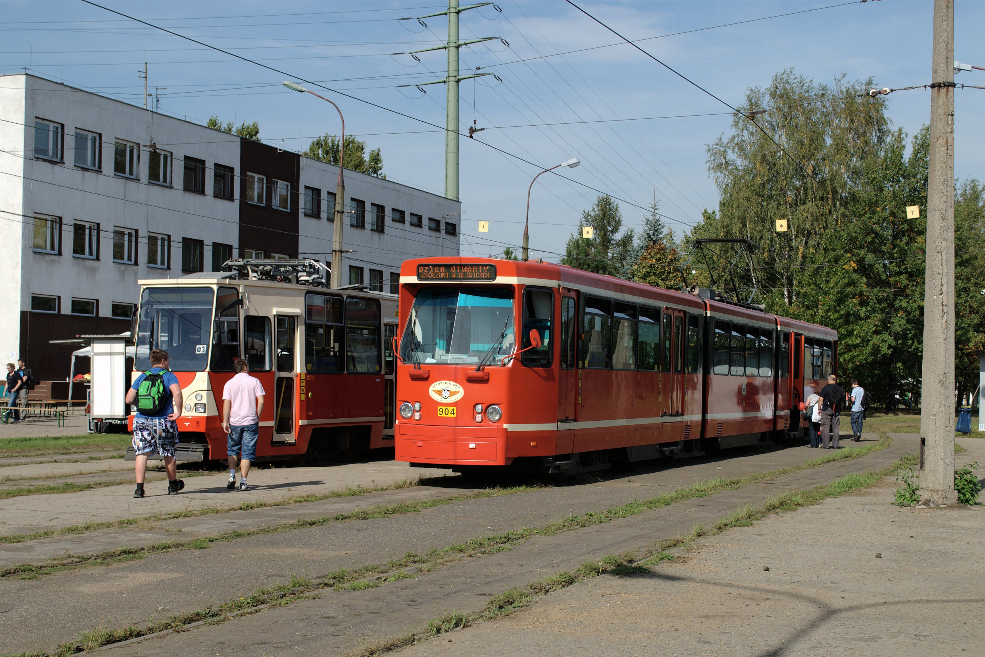 Konstal 111N i Duewag Pt